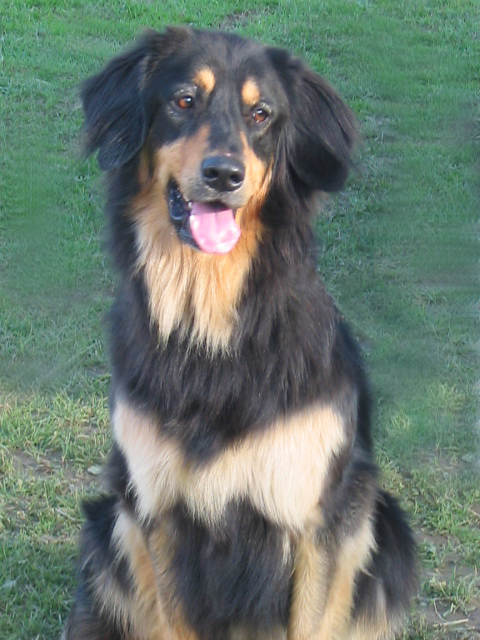 Zweejäreg Hovawart-Mudder Junon-Tina von der Tobelhöhe.